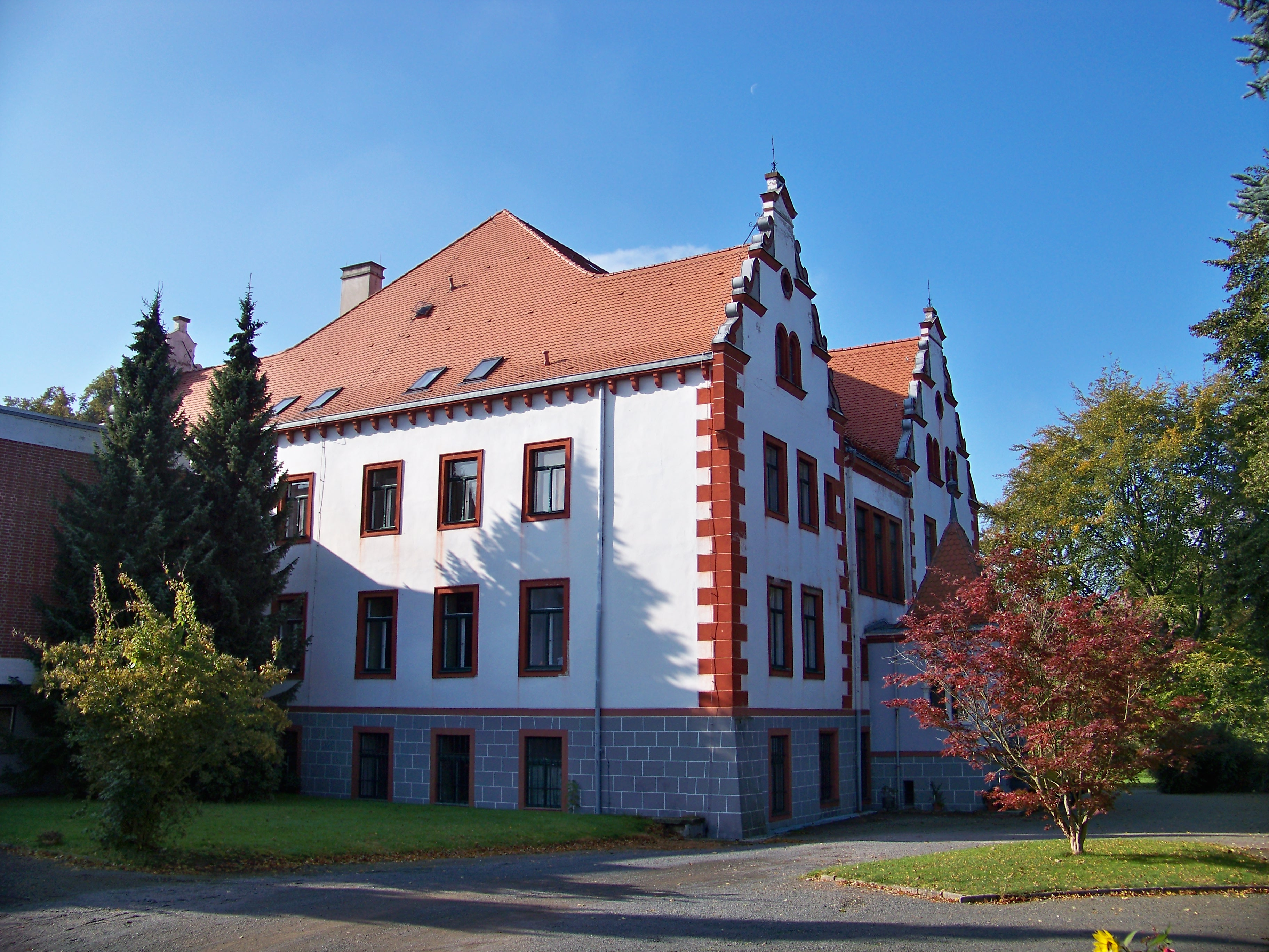 Schloss in Thammenhain/Sachsen